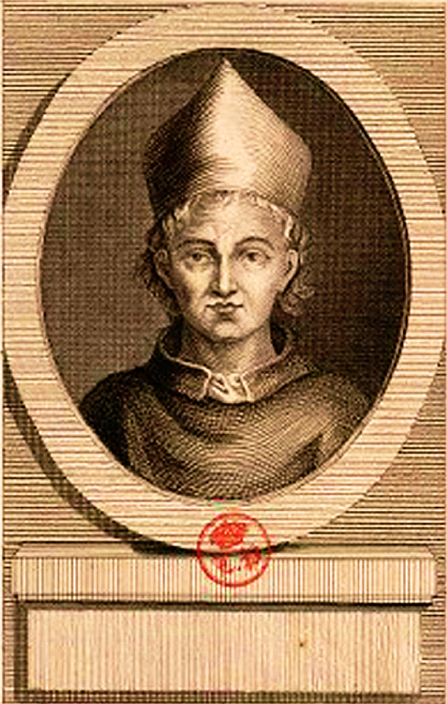 Cardinal Jacques de Via